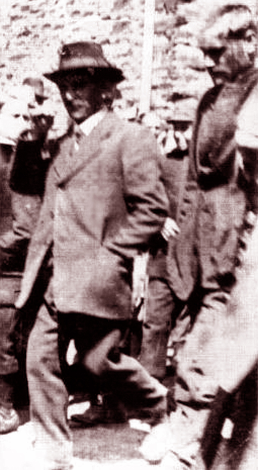 Der in der Eifel als „Stumpfarm“ bekannte fünffache Mörder Johann Mayer (1886-1923), rechts im Bild unmittelbar nach seiner Festnahme 1922 auf dem Weg zum Gefängnis in Kaisersesch. Mayer wurde 1923 im Kölner Gefängnis Klingelpütz durch Enthauptung hingerichtet. Bearbeitete historische Aufnahme.